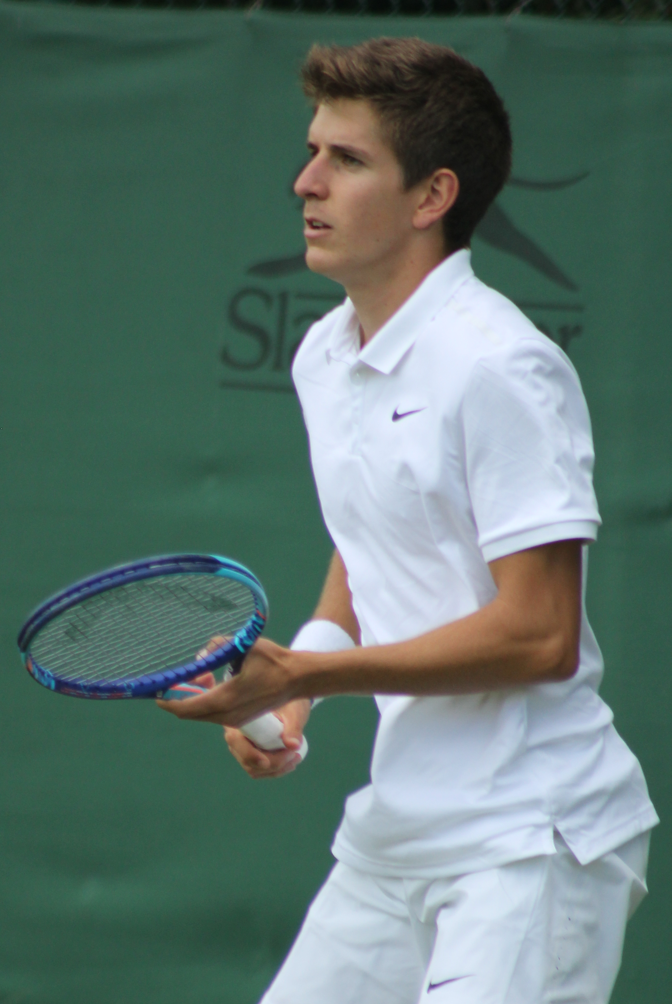 Donati WMQ15 (5)